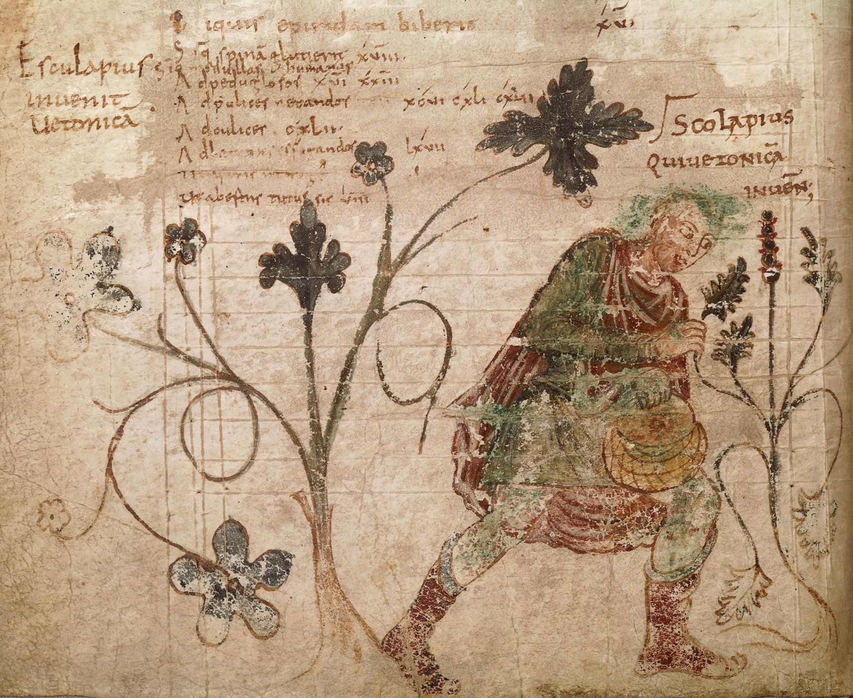 Esculape découvrant la bétoine, folio 18v, dans : Anonyme, De ponderibus medicinalibus (3r) ? Pseudo-Hippocrates latinus, Epistola ad maecenatem (3v-5v). Antonius Musa, Epistola de herba vetonica (19-22v). Pseu-Apuleius, herbarius (sive Liber de nominibus et virtutibus herbarum) et pseudo-Dioscorides, De herbis femininis (22v-63v), Bibliothèque nationale de France, département des Manuscrits, latin 6862.